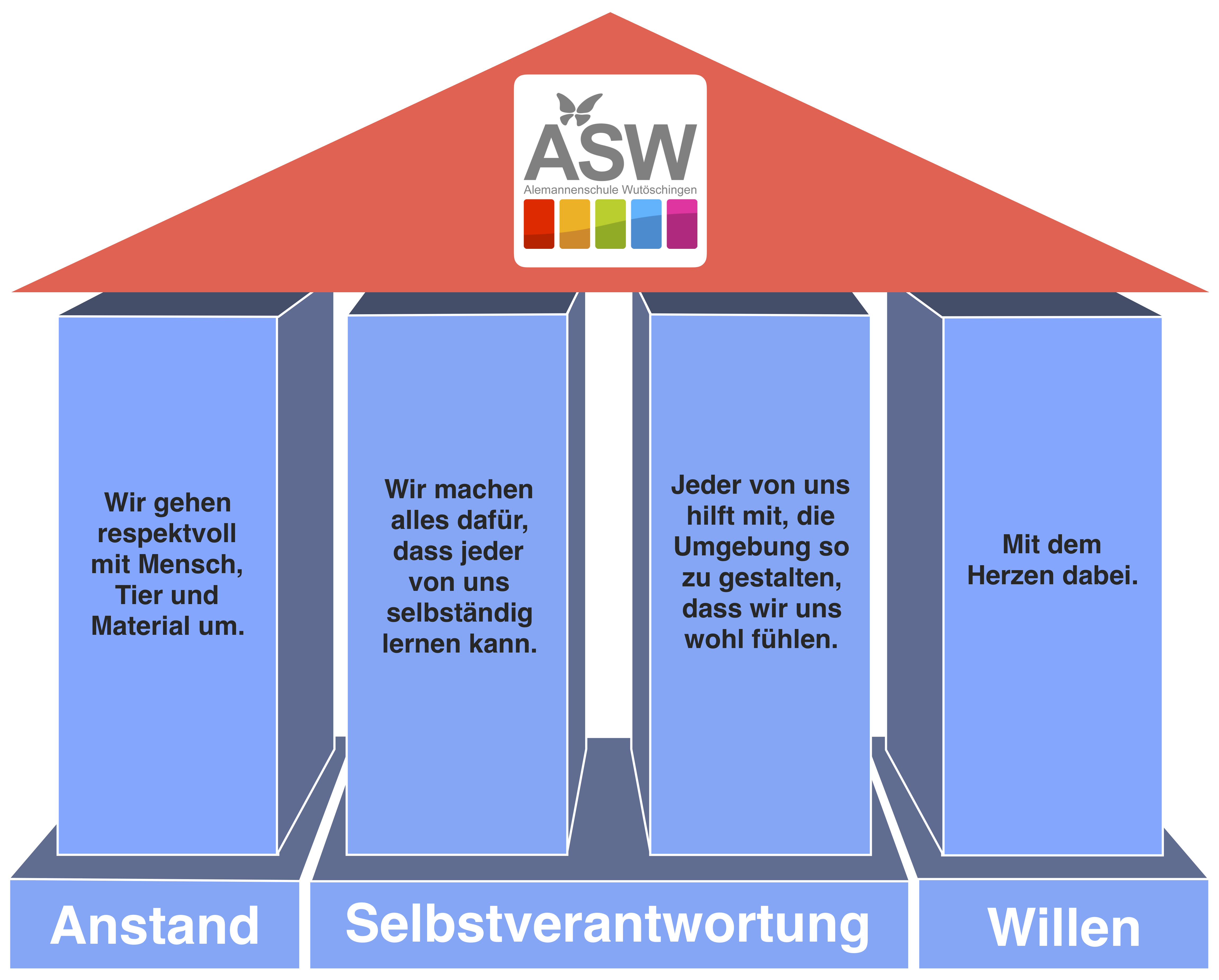 ASW Alemannenschule Wutöschingen. Gemeinschaftsschule mit integrierter gymnasialer Oberstufe in der Gemeinde Wutöschingen im Landkreis Waldshut in Baden-Württemberg. Graphik eines Lernplans.